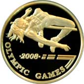 Памятная монета Республики Казахстан «Olympic Games 2008» из серии «Спорт» - Золото - 500 тенге - реверс